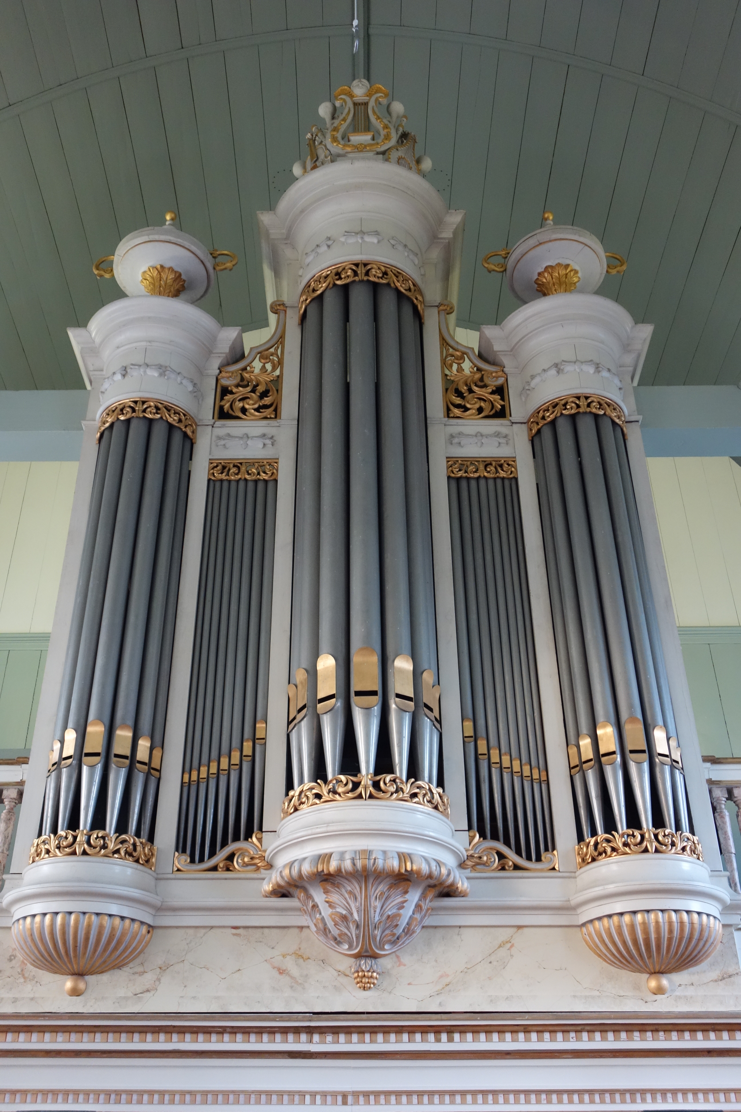 Het Flaes en Brünjesorgel uit 1866 in de Hervormde Kerk van Kwadijk.